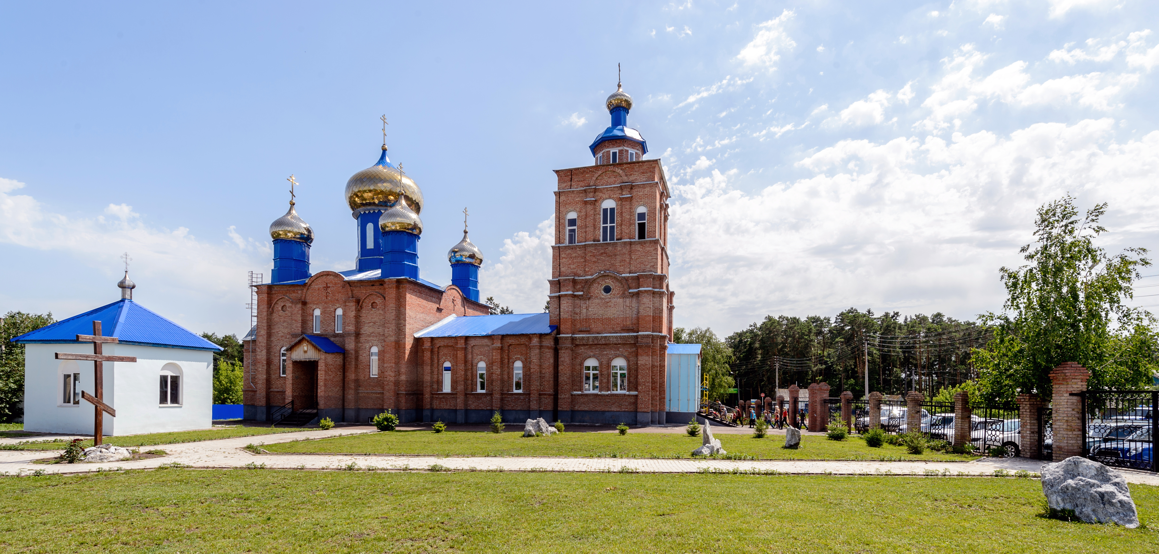 St. Tikhon's Church